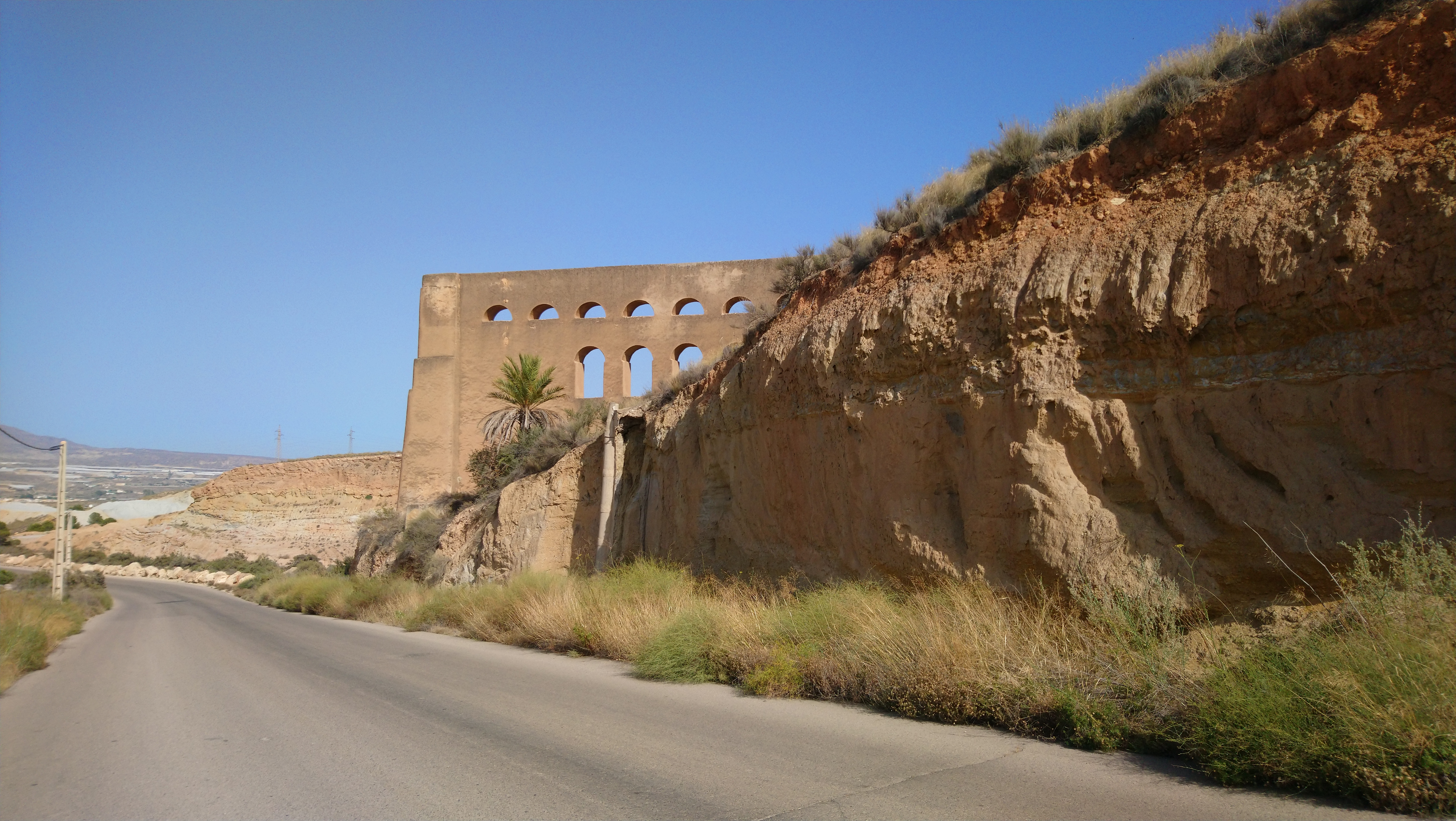 Caz de Araoz